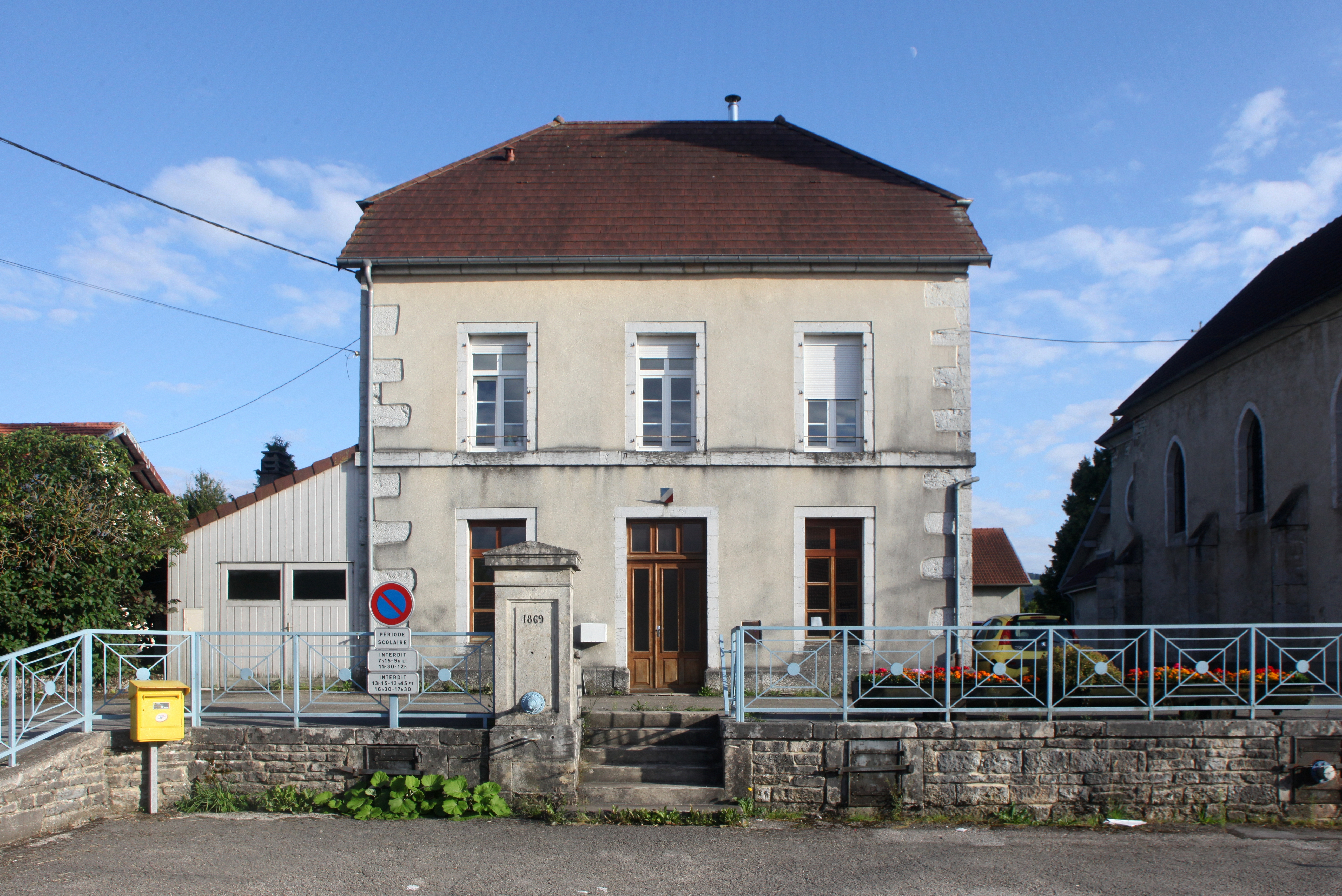 Mairie de Silley-Amancey (Doubs).